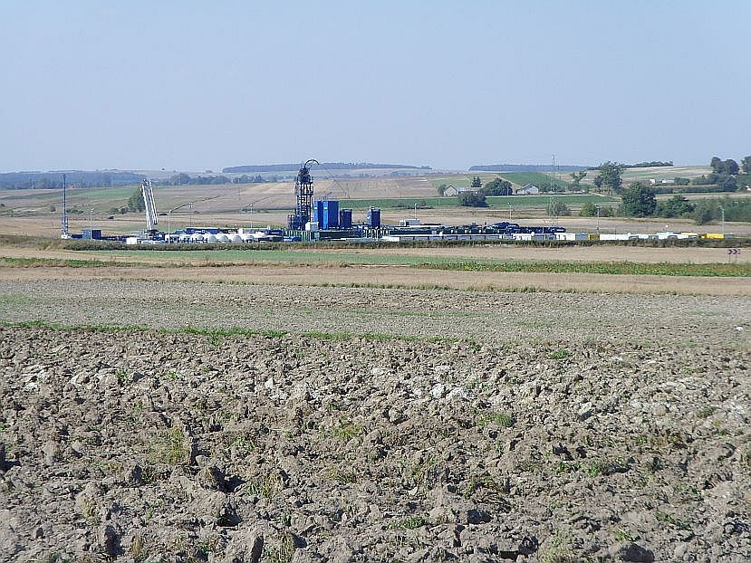 Stacja wiertnicza gazu łupkowego we wsi Krynica w powiecie krasnostawskim w województwie lubelskim. Fotografia wykonana przez Dominikę w trakcie rajdu pełzakowego (Beata, Dominika, Karol) po powiecie krasnostawskim.